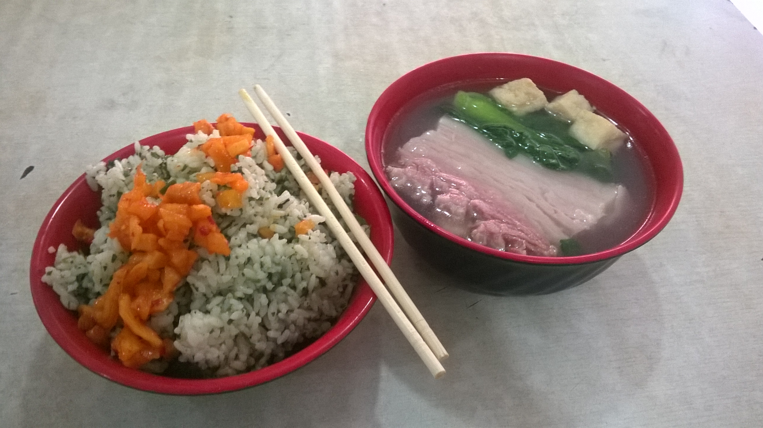 吴语: 咸肉菜饭是江南地区邪气流行个饮食